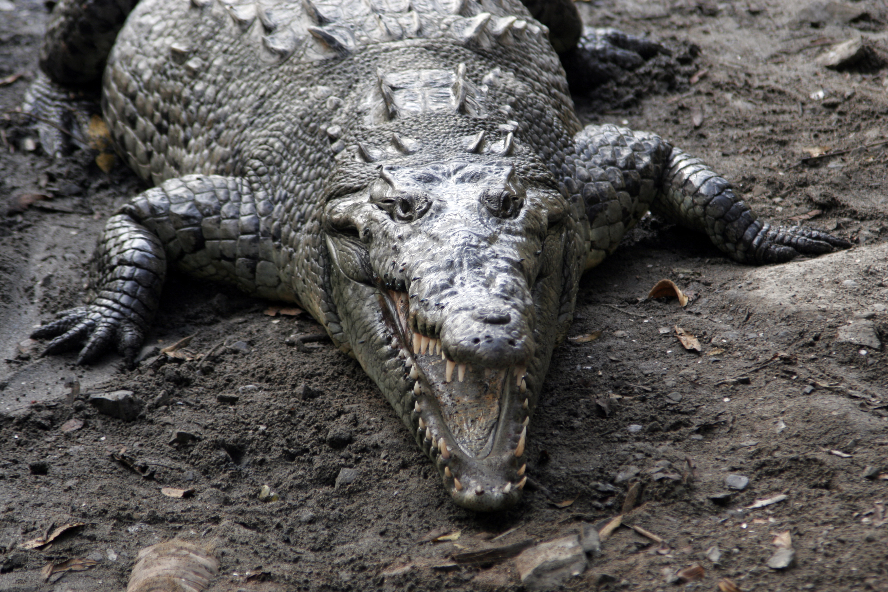 Crocodylus acutus, American Crocodile, Cocodrilo Americano. Photo taken at La Manzanilla, Jalisco, Mexico